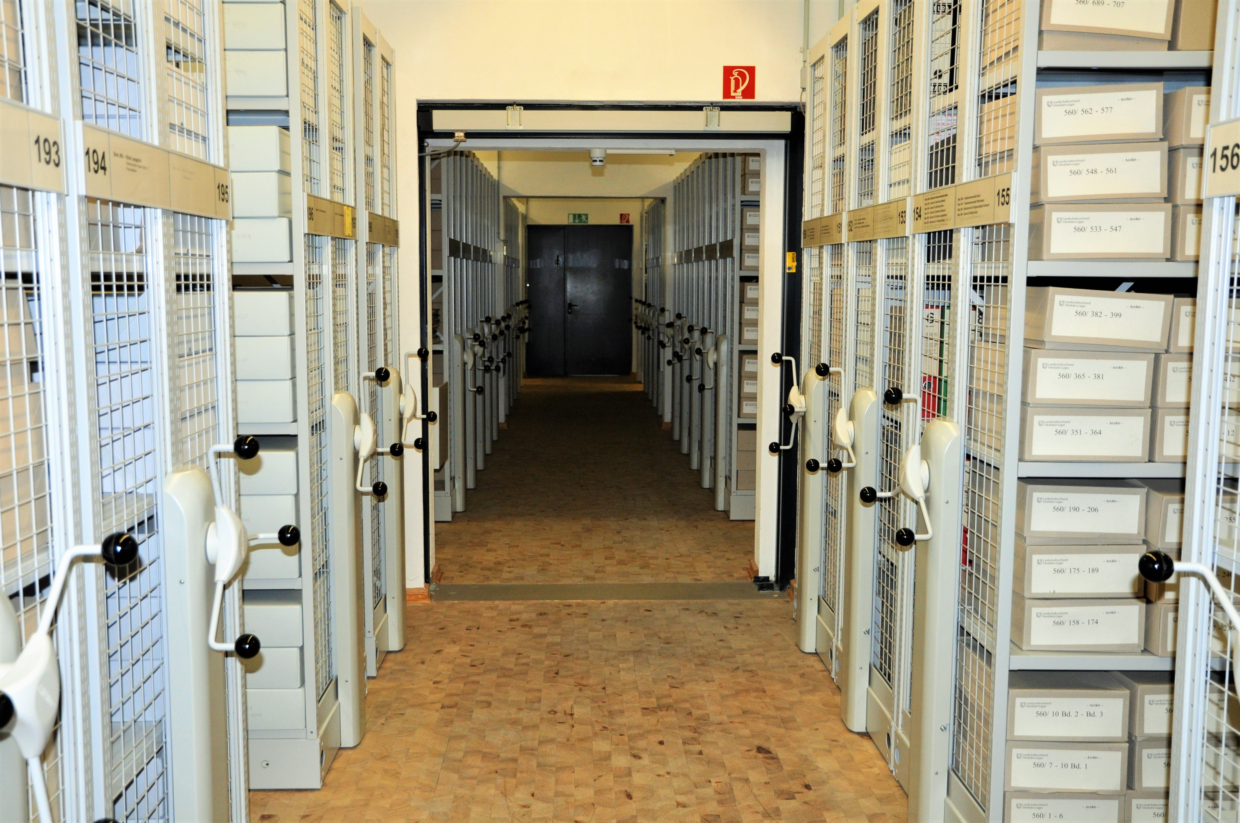 Magazinraum des LWL-Archivamtes